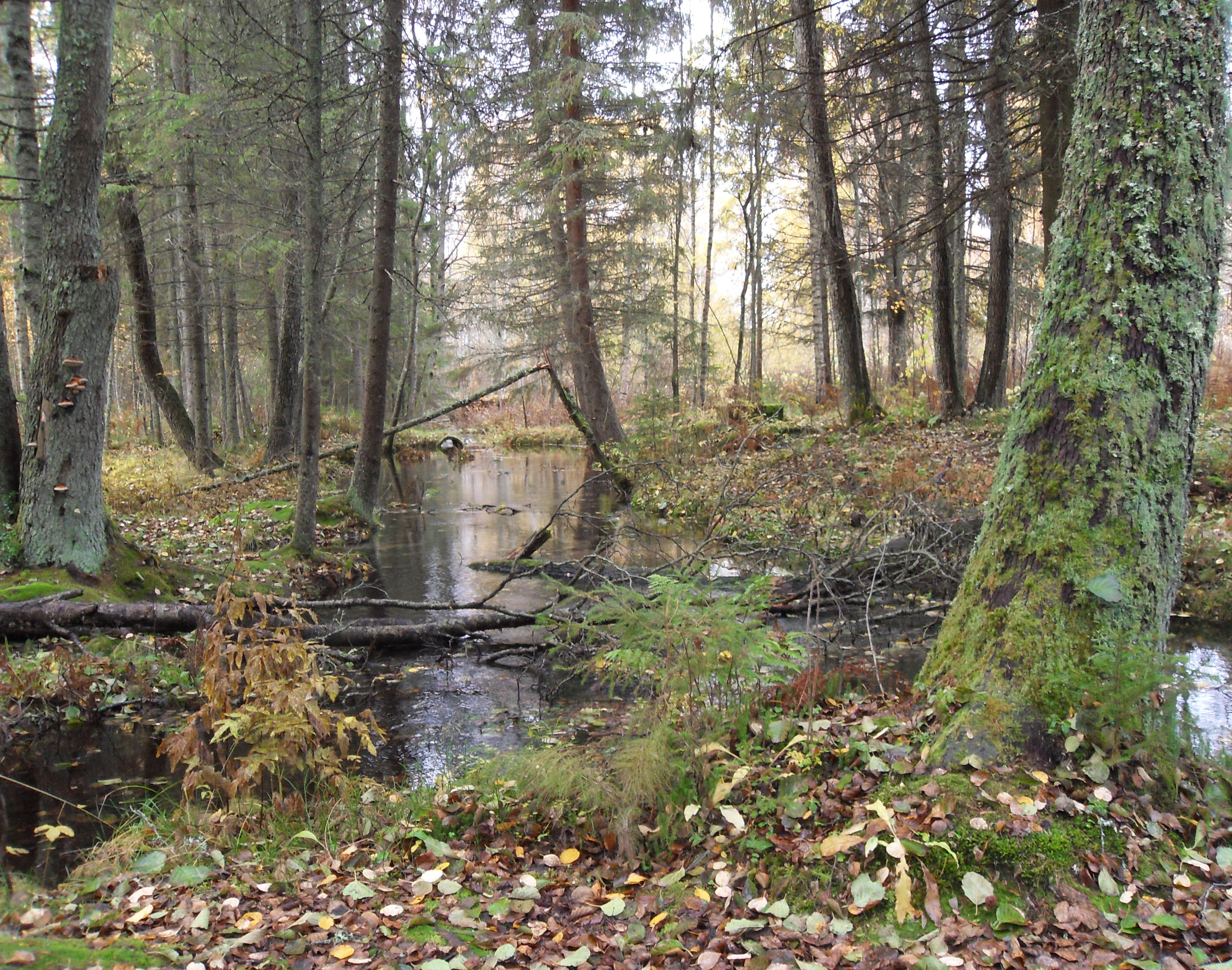 Kankaanpään Kuninkaanlähteestä alkava puro. Lähteeseen on perimätiedon mukaan uhrattu ja sen vedellä on parannettu muun muassa silmäsairauksia. Kuva on kuvattu osana Taivaannaula ry:n suomalaisen kansanperinteen tuntemia pyhiä luonnonpaikkoja kartoittavaa Hiisi-hanketta.